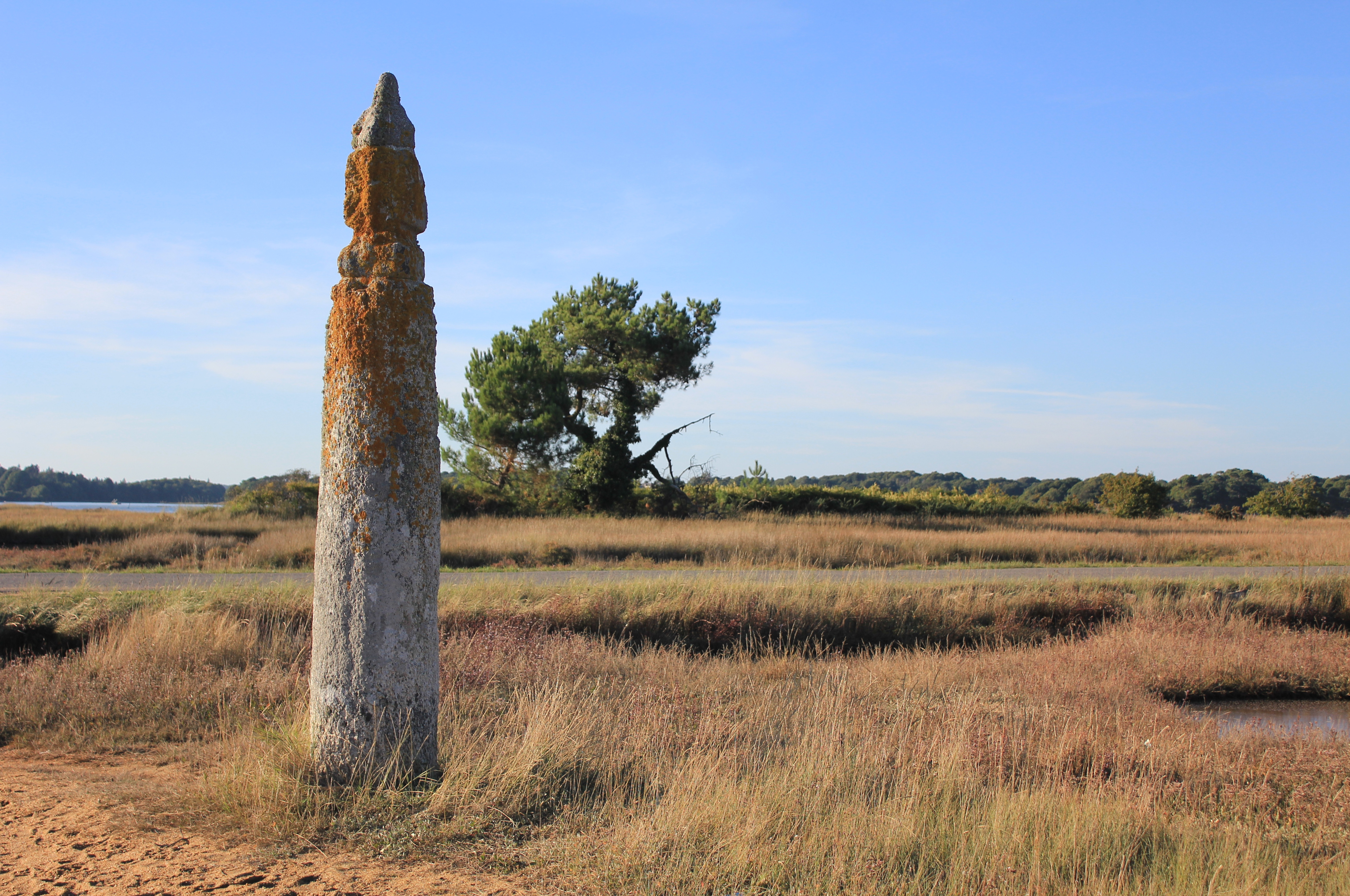 Lec'h Men-er-Menah, vue du sud vers le nord .